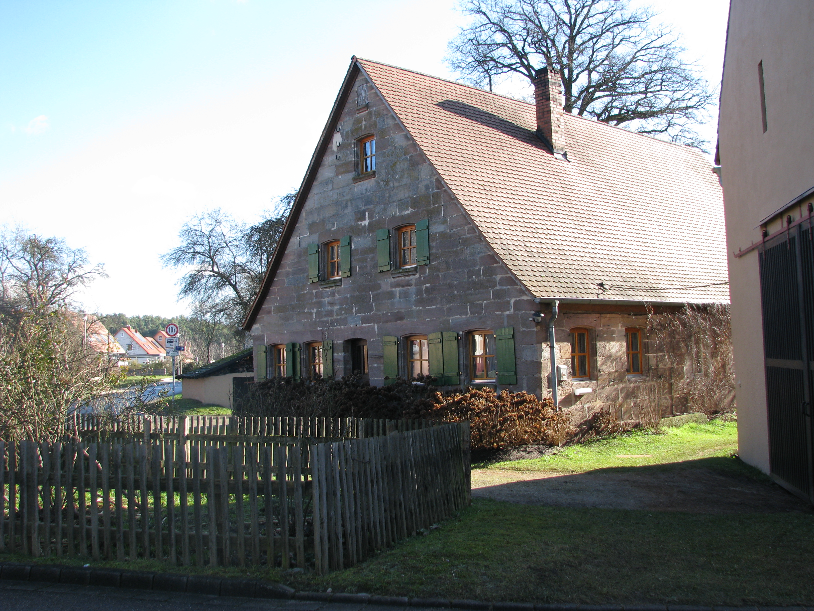 Heuberg, Ortsteil von Hilpoltstein im mittelfränkischen Landkreis Roth in Bayern, altes Wohnstallhaus